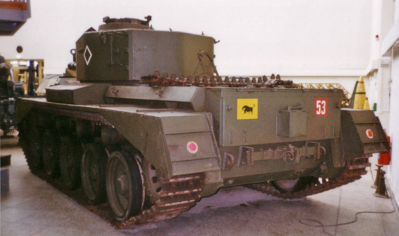 Beschreibung: Comet tank / Armeemuseum Dresden